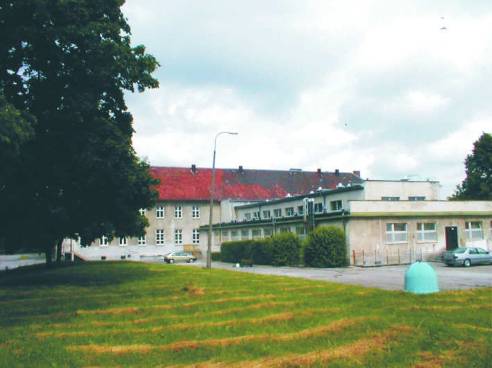 Witok na stołówkę żołnierską 10.06.2002 r.